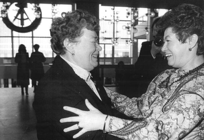 ADN-ZB Senft-5.3.87-kb-Berlin: XII. DFD-Kongreß- Ein herzliches Wiedersehen zwischen Irma Gabel-Thälmann (l.) und Eva Budilova, Sekretär des ZK des Tschechoslowakischen Frauenbundes, vor Beginn des Bundeskongresses des DFD im Palast der Republik.